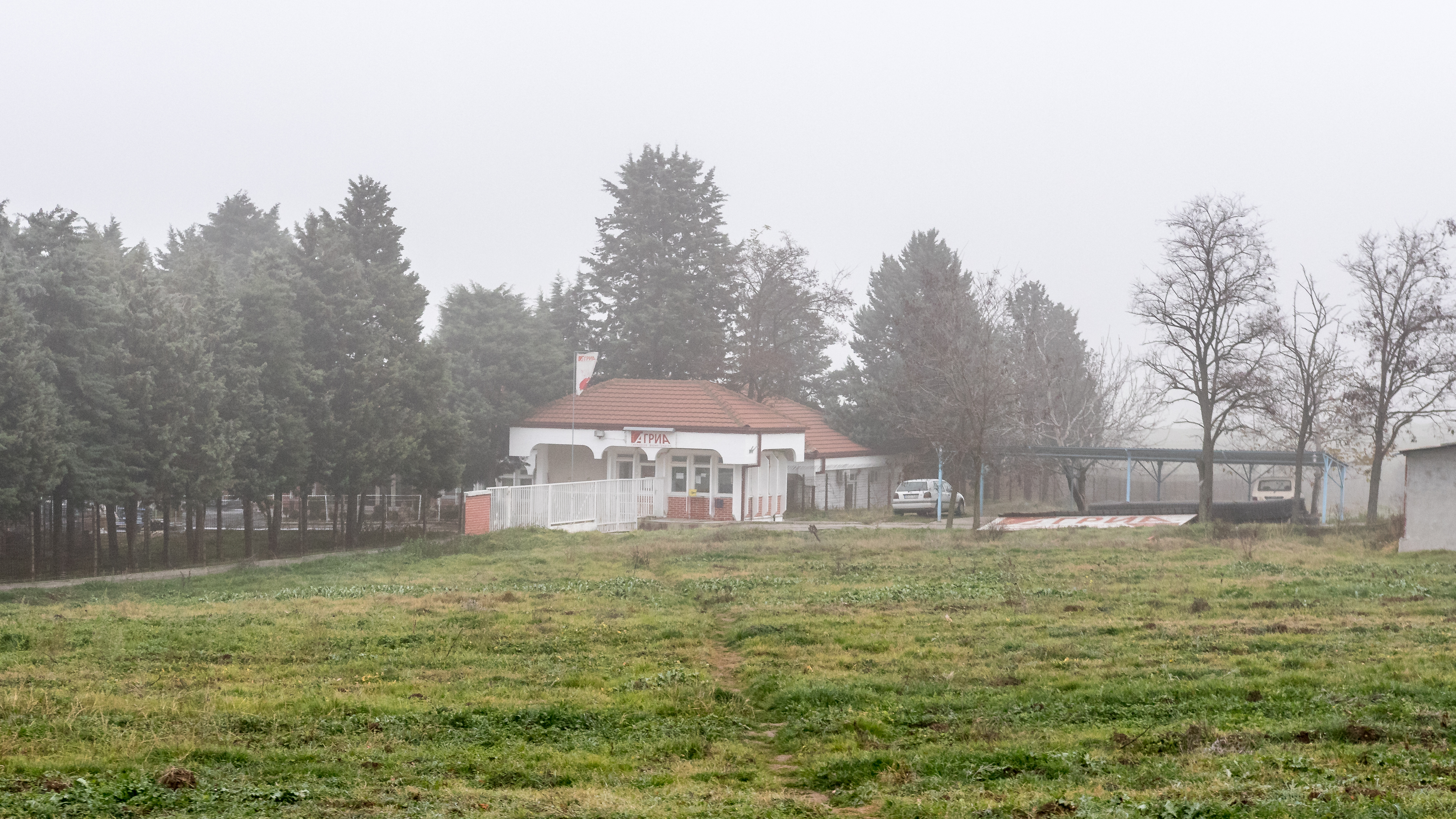 Фотографии од експедицијата во Градско